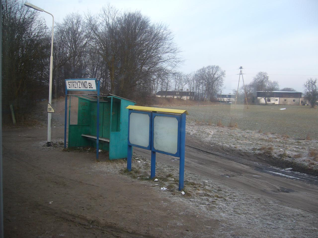 Przystnek w Strzyżnie